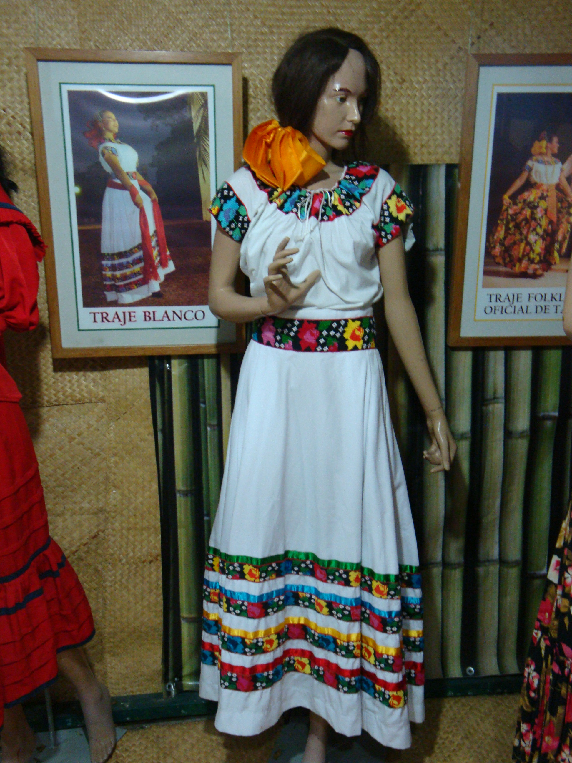 Traje regional de gala del estado de Tabasco, México.